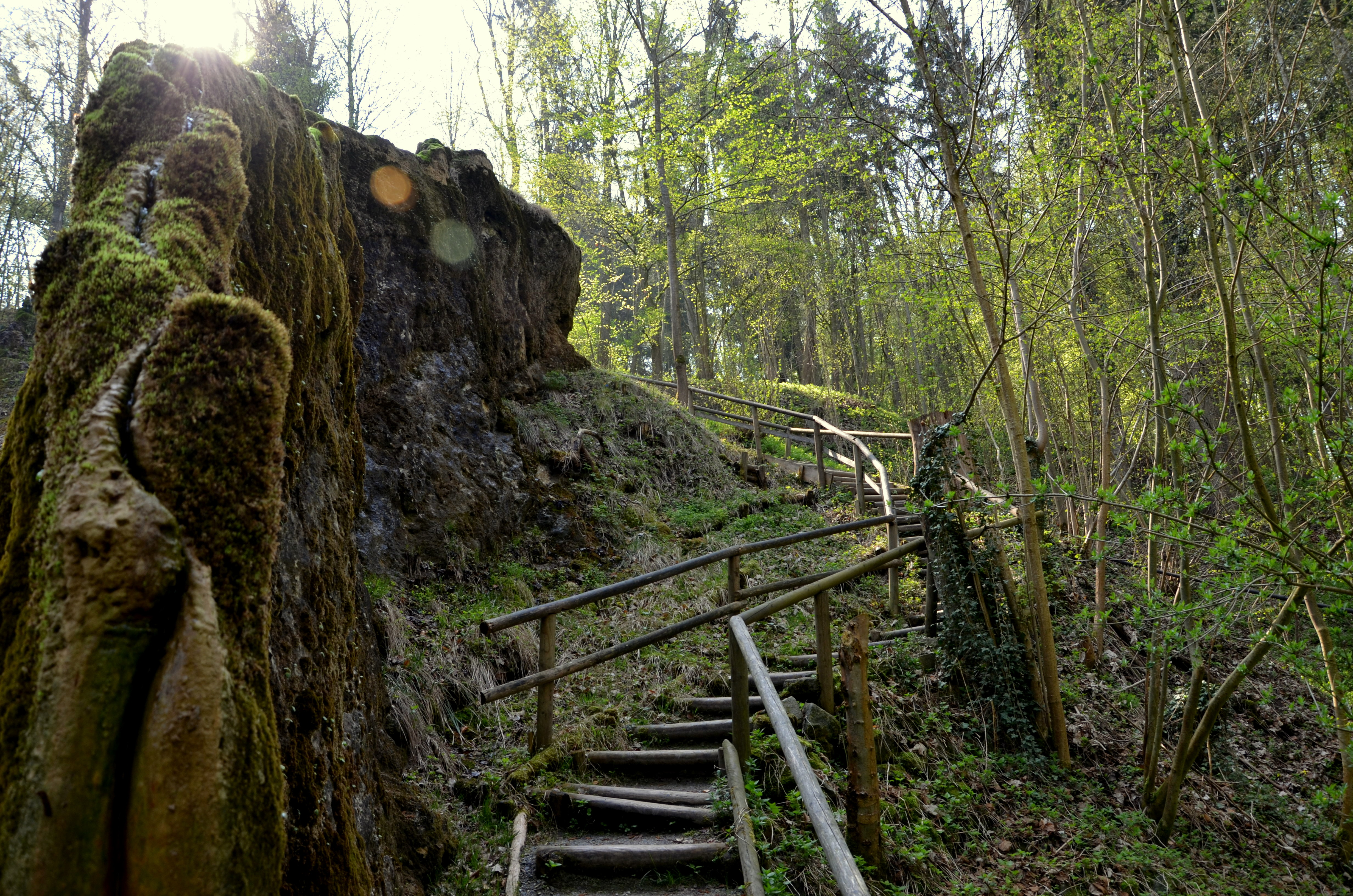 Der Wachsende Felsen ist ein Naturdenkmal in Usterling, einem Ortsteil von Landau an der Isar im niederbayerischen Landkreis Dingolfing-Landau. Er ist einer der seltenen großen Karstgebilden, die zur Gruppe der Steinernen Rinnen zählen. Diese Rinne ist in über 5000 Jahren zu einer mit fast 40 Meter Länge und 5 Meter Höhe Rinne angewachsen und damit die größte Steinerne Rinne in Deutschland. Geotop Nr. 279R004.